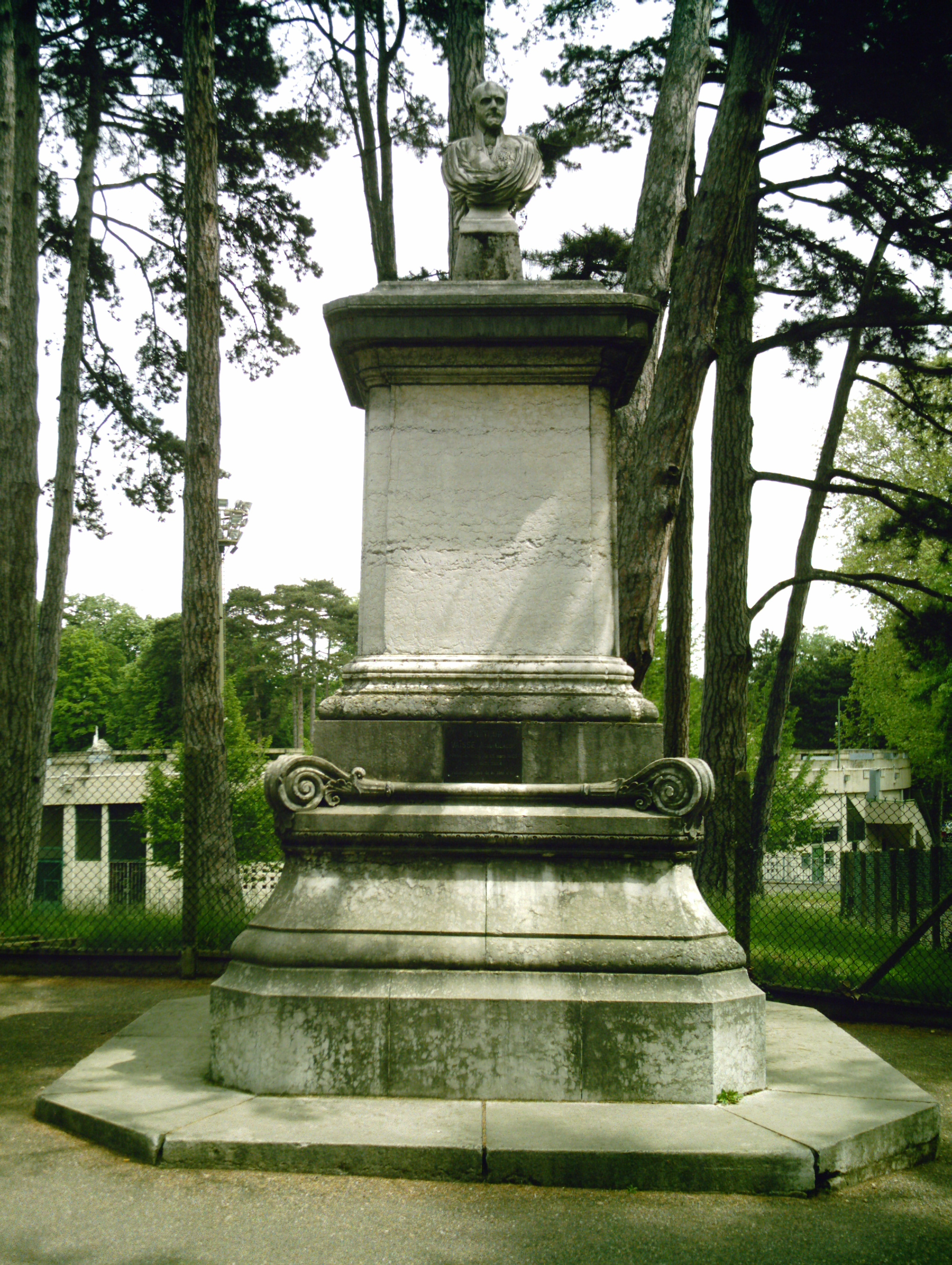 Statue du sénateur Jean-Claude Vaïsse, réalisée par le sculpteur Guillaume Bonnet, située au Parc de la tête d'Or (Lyon, Rhône, FRANCE), avec l'inscription sur la plaque : " SENATEUR VAISSE Jean-Claude Préfet du Rhône du 25 mars 1853 au 29 août 1864 Créateur du parc de la tête d'Or "